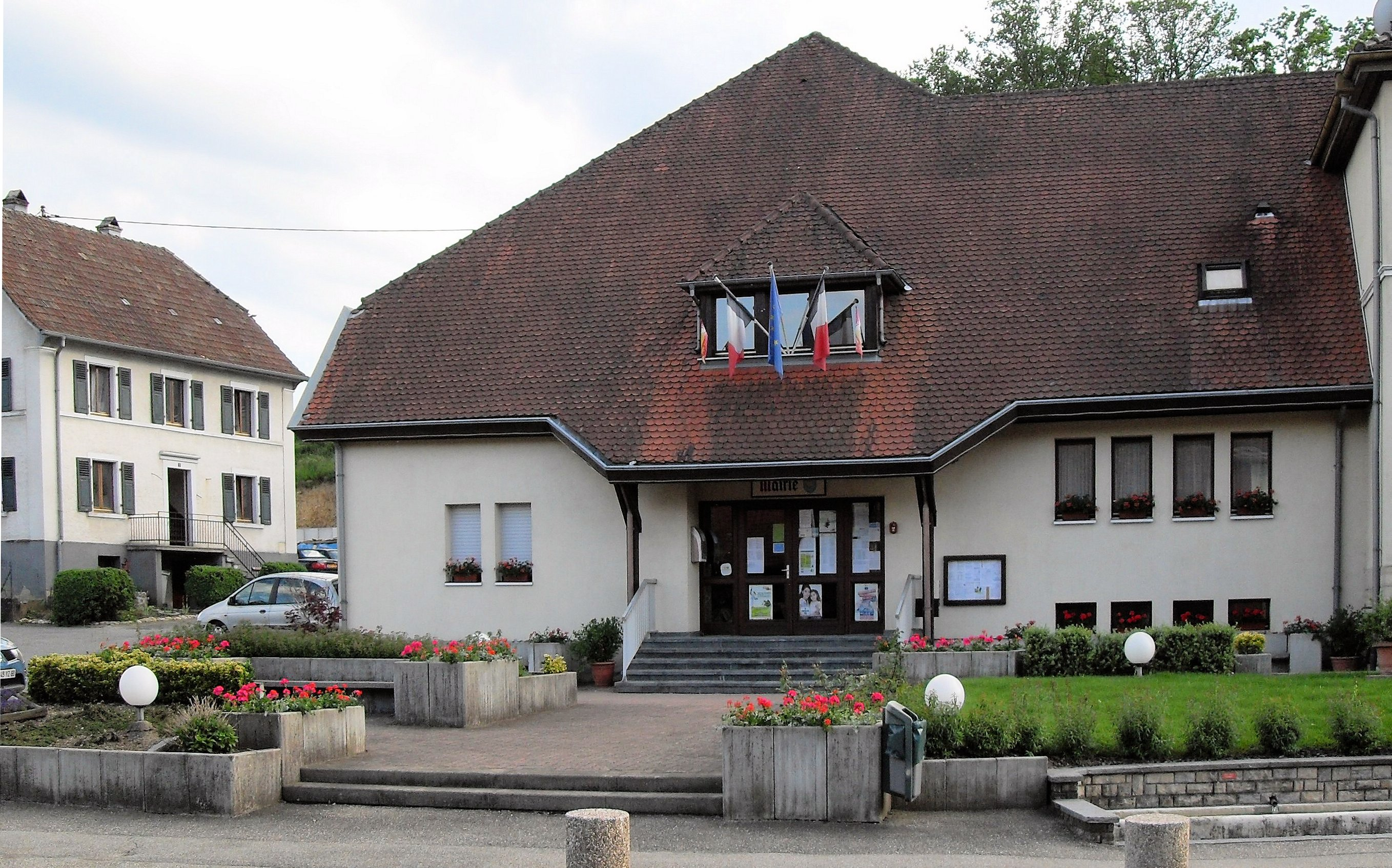 La mairie de Seppois-le-Haut